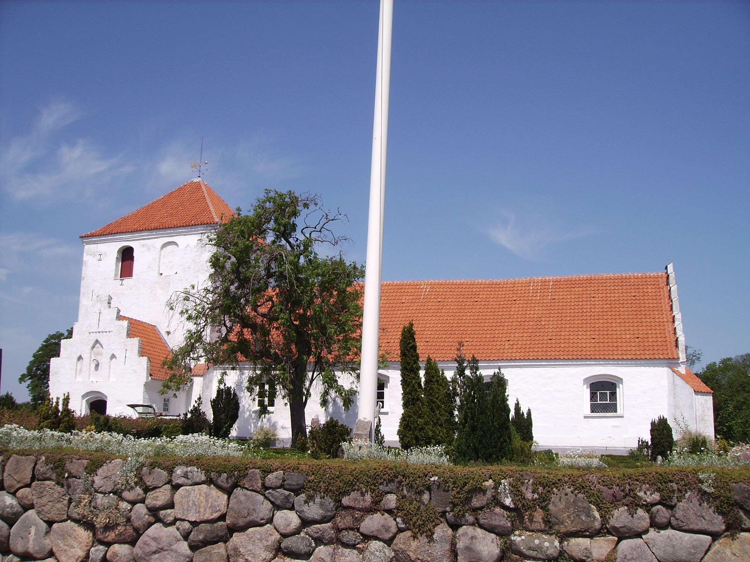 Munkebo Kirke, Munkebo Sogn, Bjerge Herred, Odense Amt, Denmark (Danish Church) - Munkebo Kirke fra syd